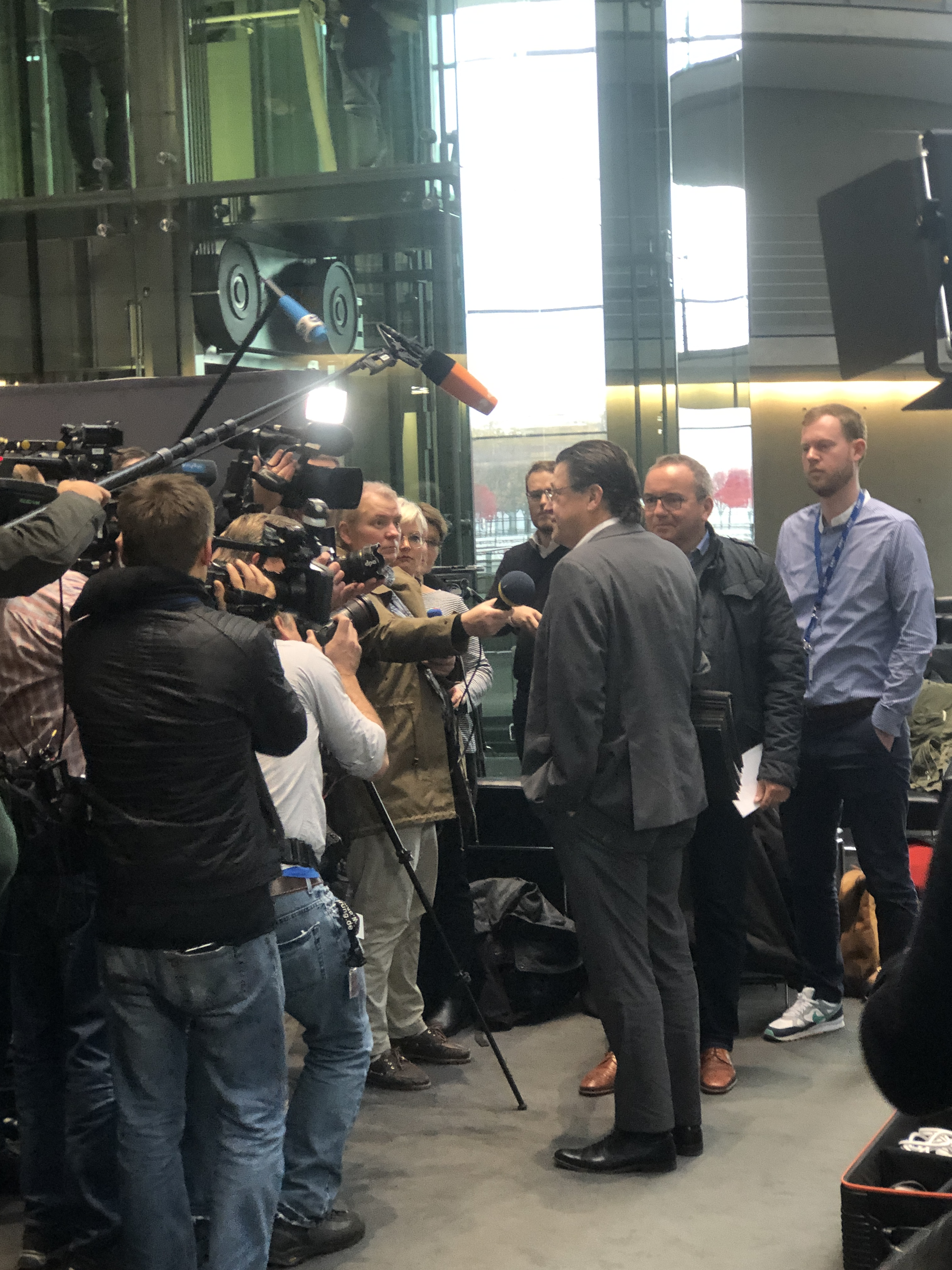 Medienauflauf im Paul-Löbe-Haus